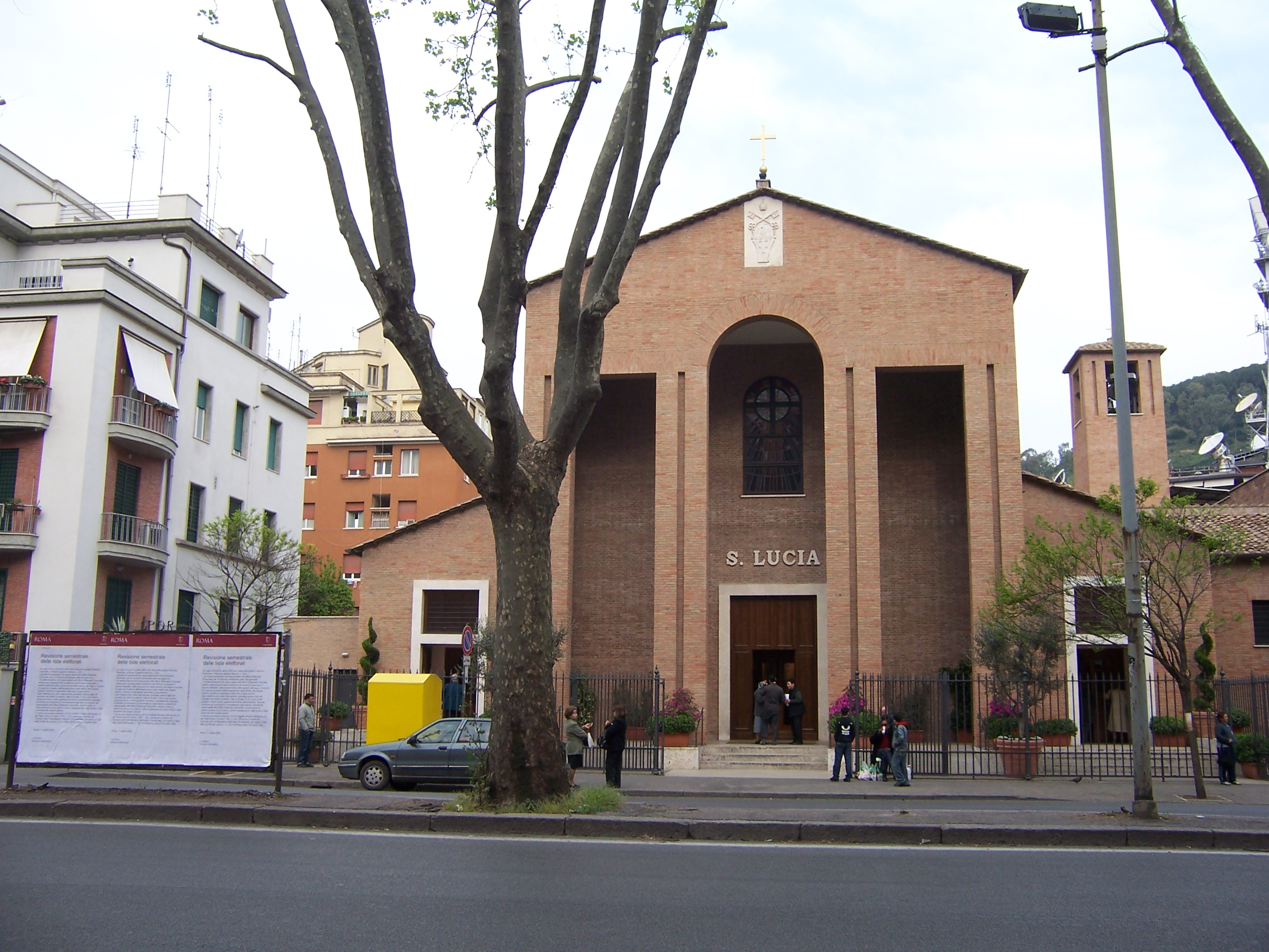 Facciata della chiesa di Santa Lucia, nel quartiere Della Vittoria, a Roma. Opera dell'architetto Tullio Rossi.